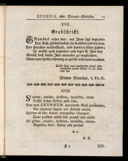 Grabschrift für Johannes Grynaeus (1705-1744), aus der für ihn von Emanuel Ryhiner (1695-1764) gehaltenen Leichenpredigt